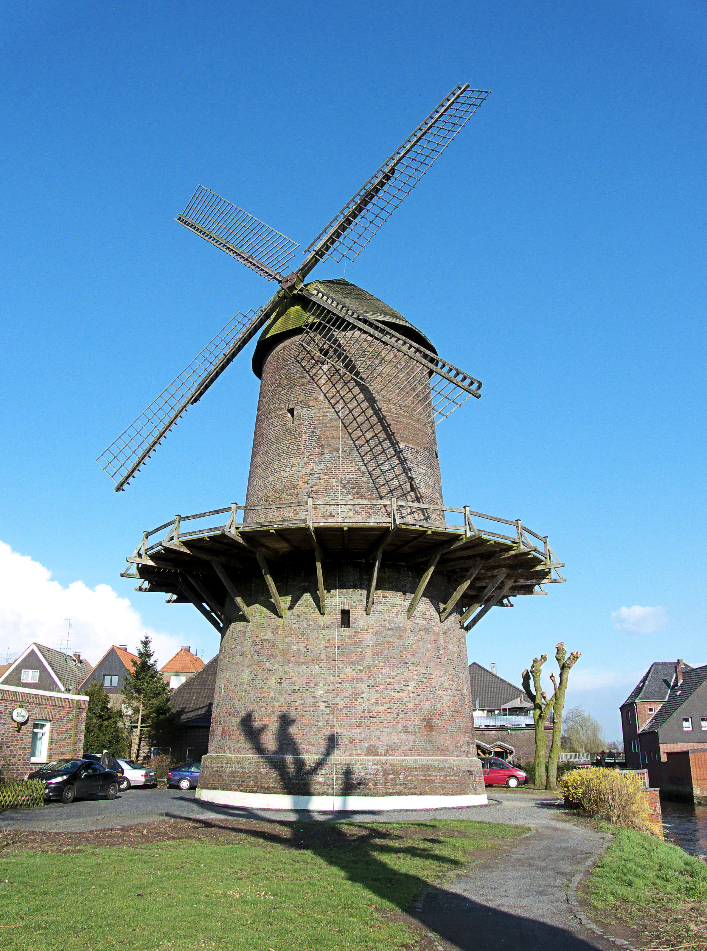 Torenmolen Turmwindmühle Werth, Duitsland